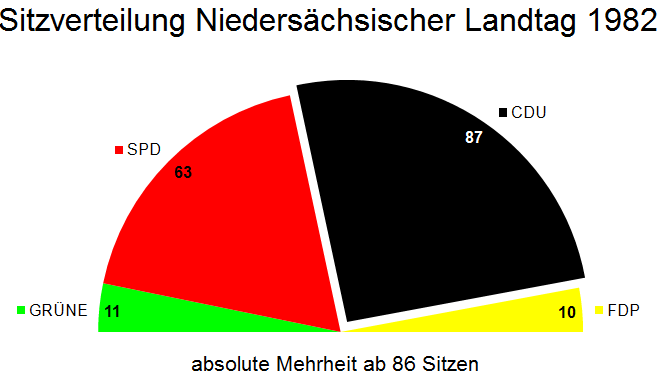 Sitzverteilung im Niedersächsischen Landtag nach der Landtagswahl in Niedersachsen 1982